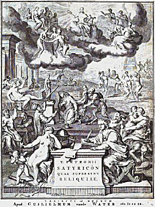 (Téléversé avec Commonist) Nouvelle version plus claire.